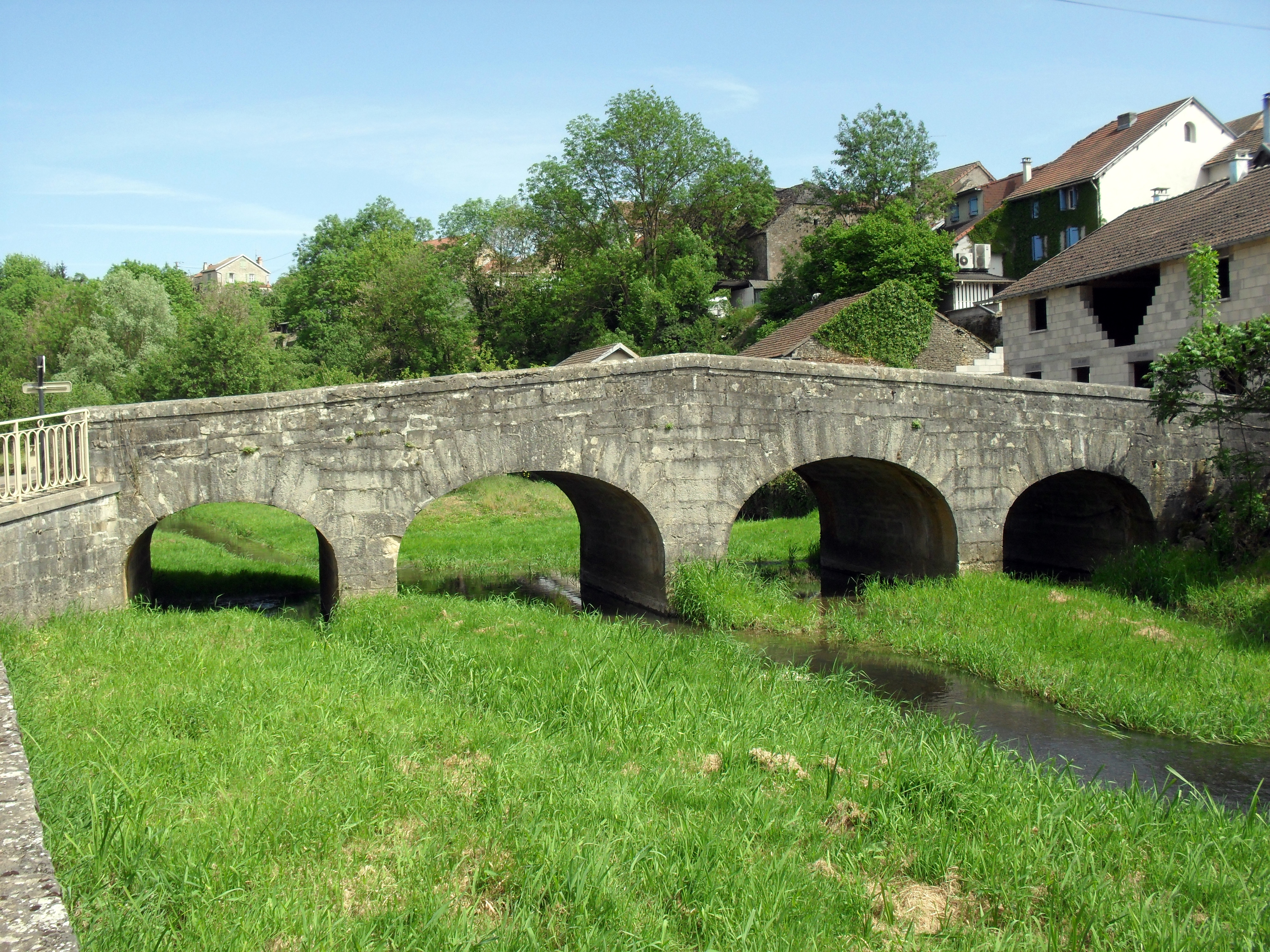 petit pont en dos d'âne, sur la Colombine